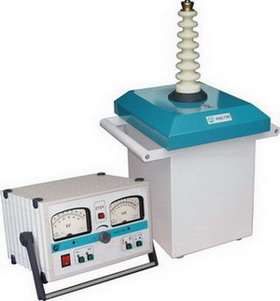 Аппарат АИД-70М